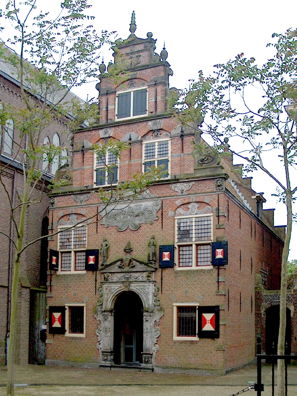 Oude Weeshuis (1551), Westerstraat, Enkhuizen.